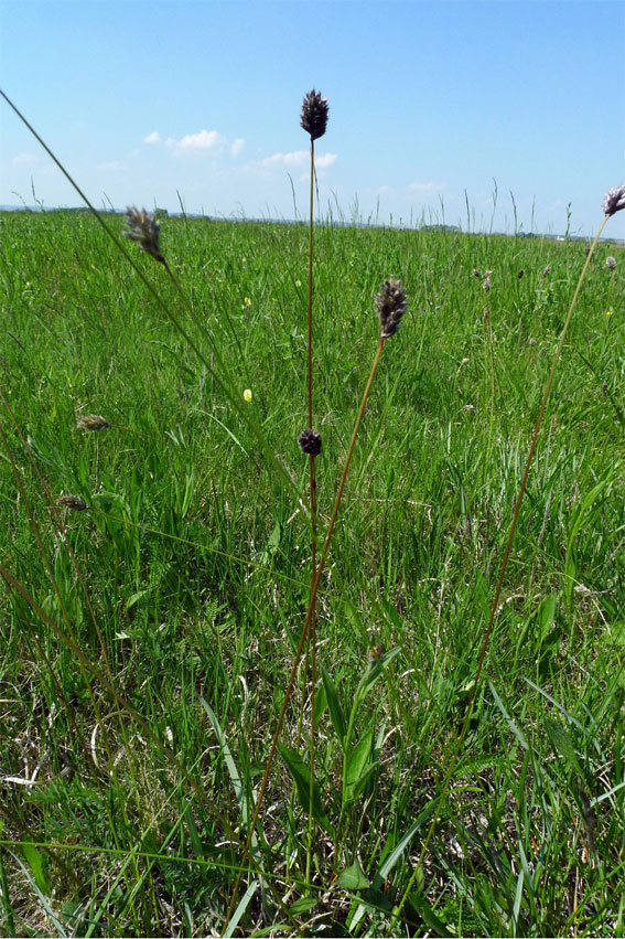 Sesleria uliginosa, Zitzmannsdorfer Wiesen, NP Neusiedler See - Seewinkel (Bezirk Neusiedl am See).